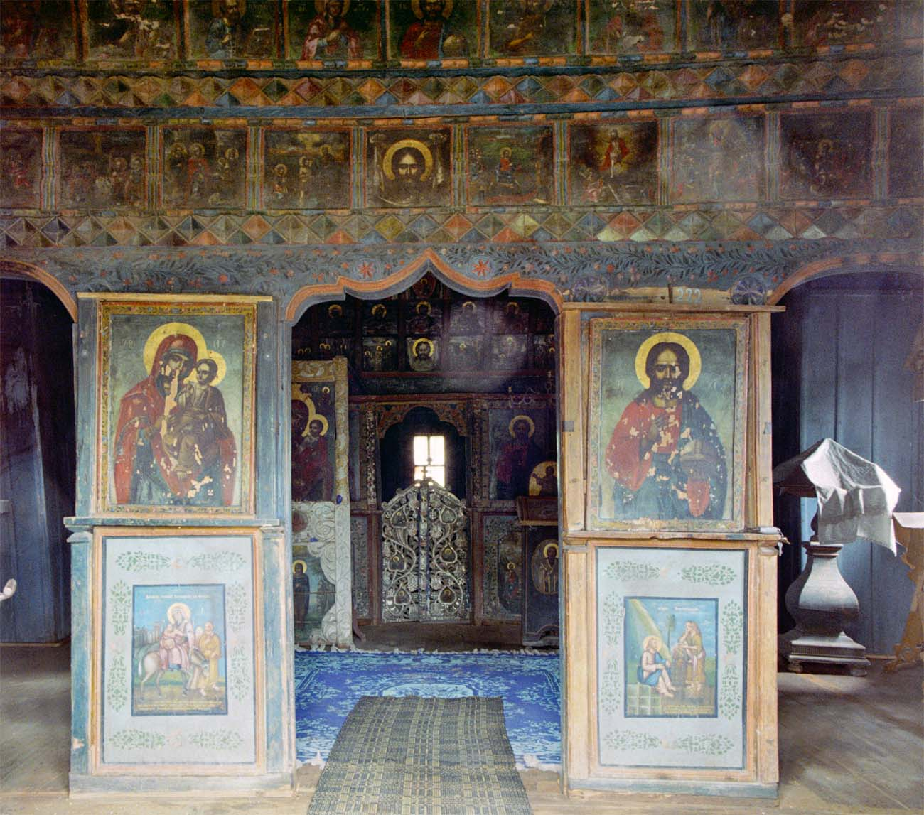 Miroslovești, Iași: biserica de lemn, interior, stâlpii spre navă.